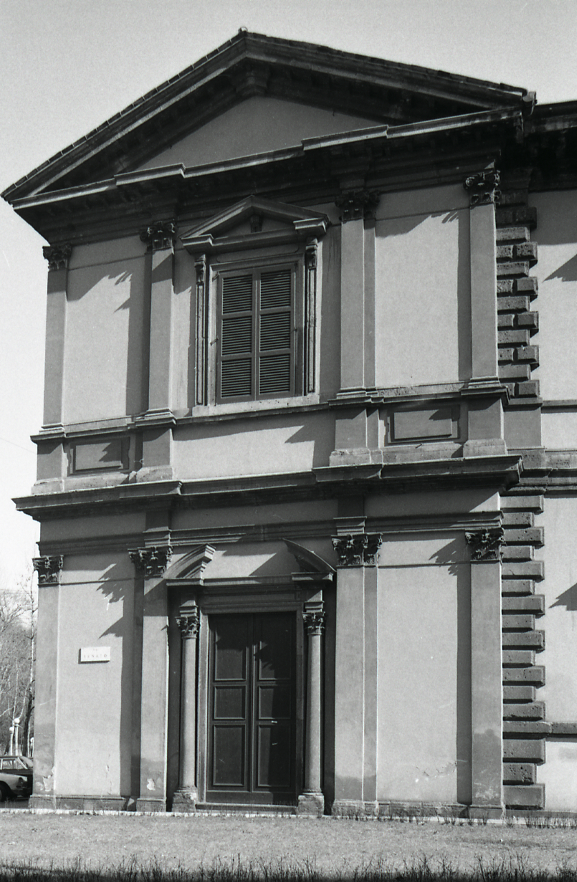 Servizio fotografico : Milano, 1971 / Paolo Monti. - Strisce: 5, Fotogrammi complessivi: 25 : Negativo b/n, gelatina bromuro d'argento/ pellicola ; 35 mm. - ((Sul portanegativi: NIKMAT FP4. - La serie è identificata da Monti con segni grafici e distinta dalla successiva. - Il fotogramma n. 29 è nella serie successiva identificata da Monti con l'iscrizione didascalica "Minguzzi". - Occasione: Documentazione per la pubblicazione: Touring Club Italiano, Milano, TCI, 1972. - Fonte: Agenda di Paolo Monti: Monti - Agenda 1971 (1971), presso Archivio Paolo Monti. - Fonte: Monografia di Touring Club